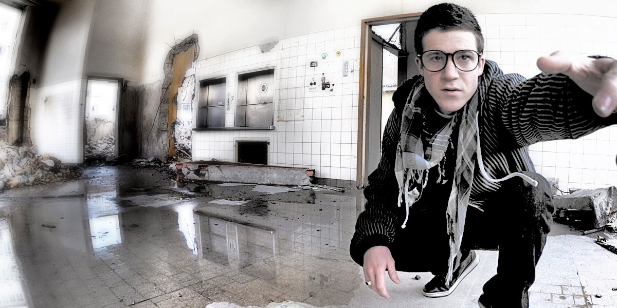 Larry F